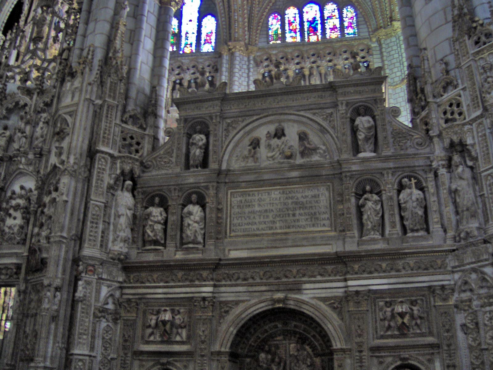 Detalle del sepulcro por la parte exterior en la catedral de Toledo